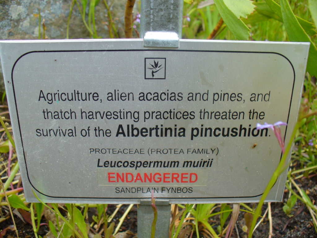 Leucospermum muirii sign